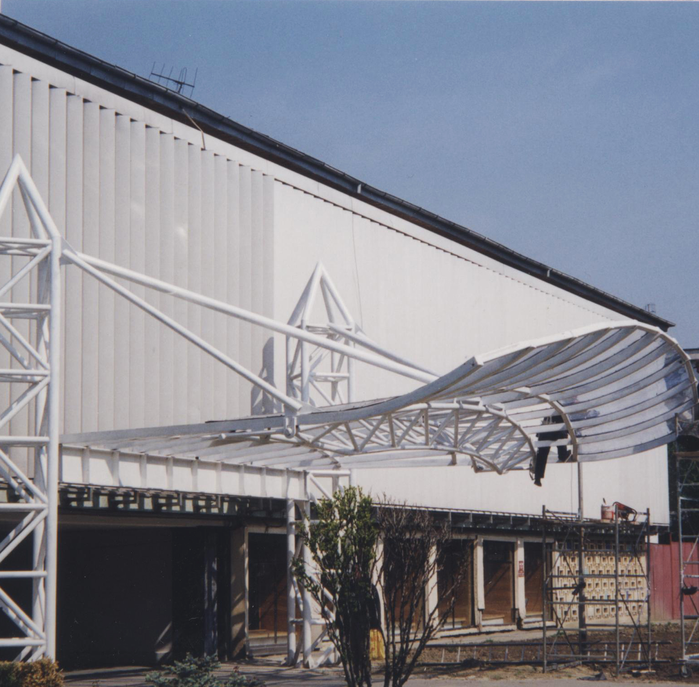 Incom Vranco (Focsani, Romania)